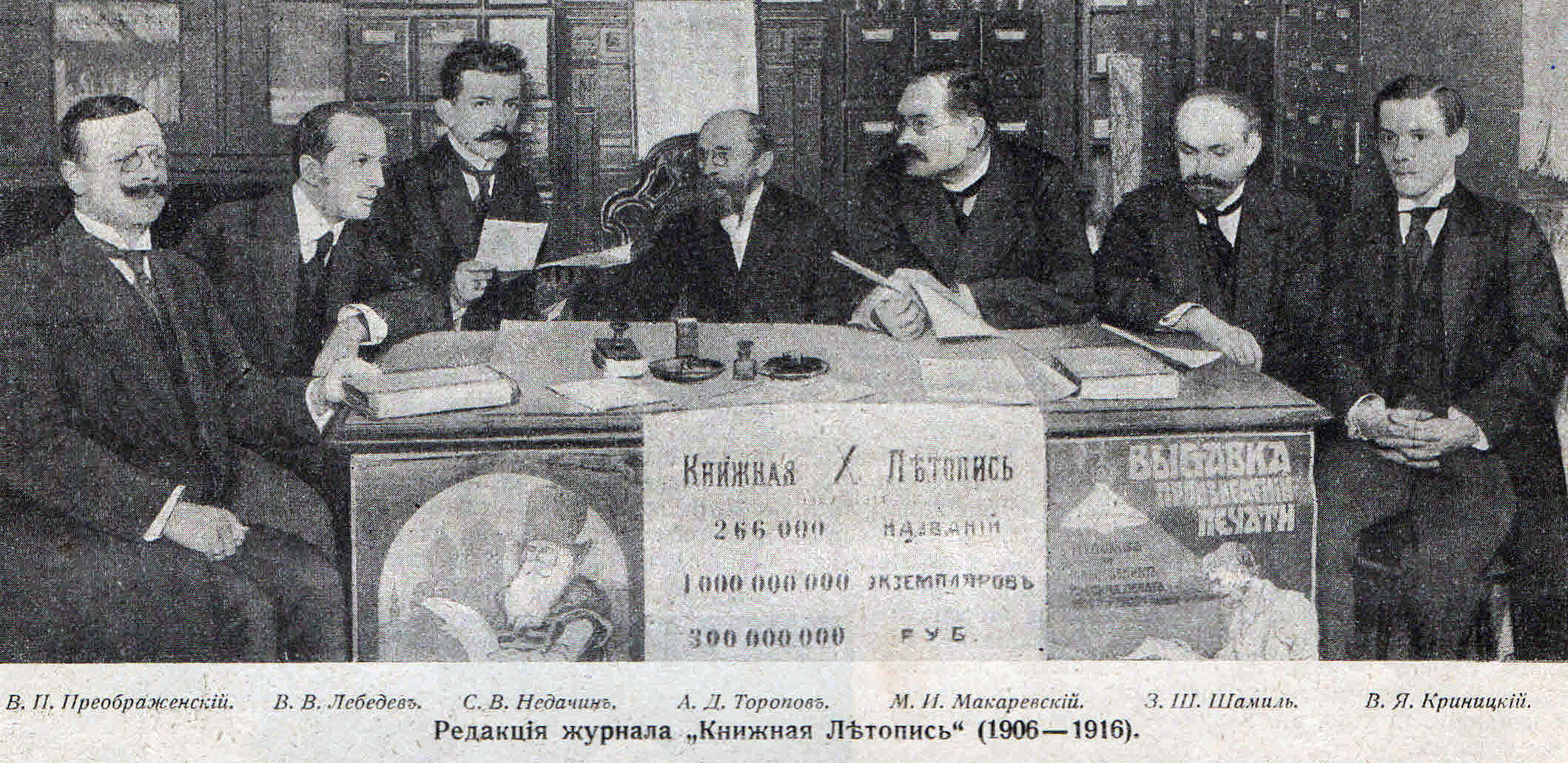 Десятилетие журнала "Книжная летопись". Редакция и сотрудники